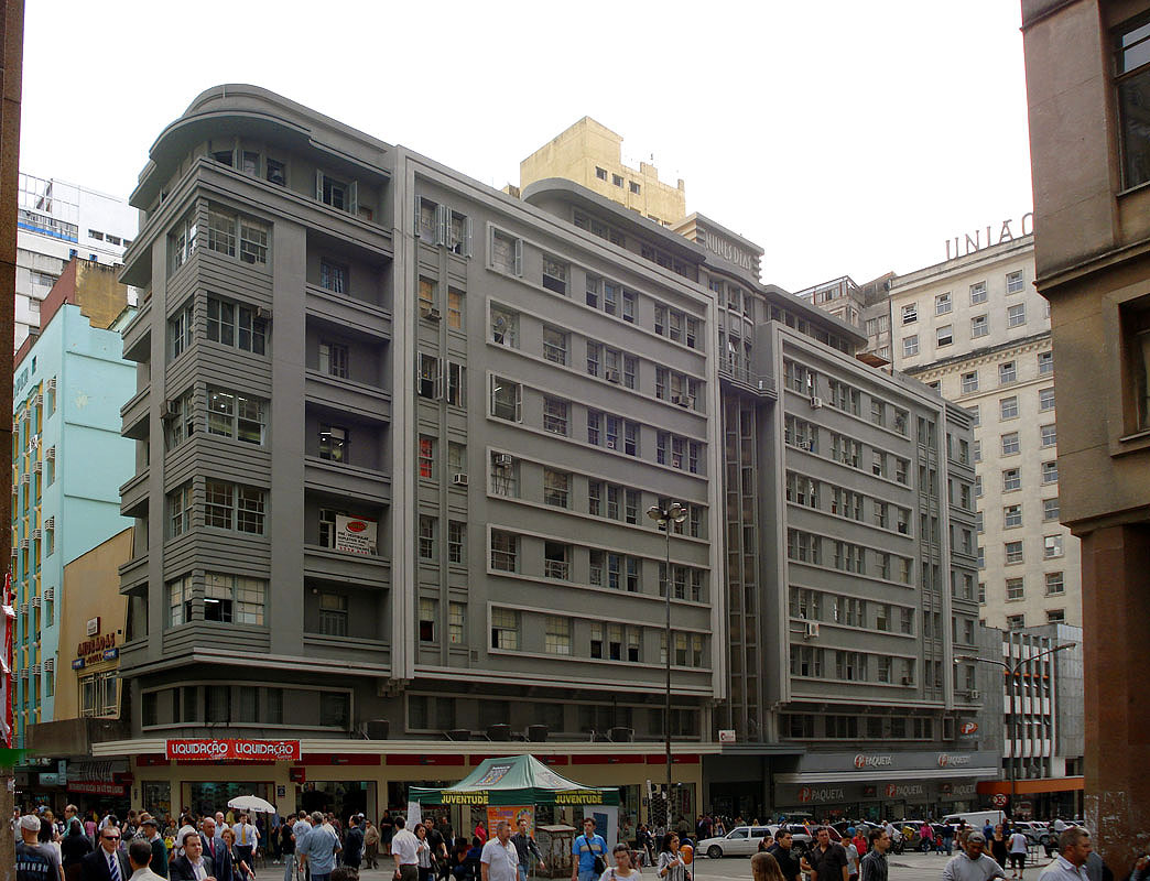 edifício nunes dias, porto alegre